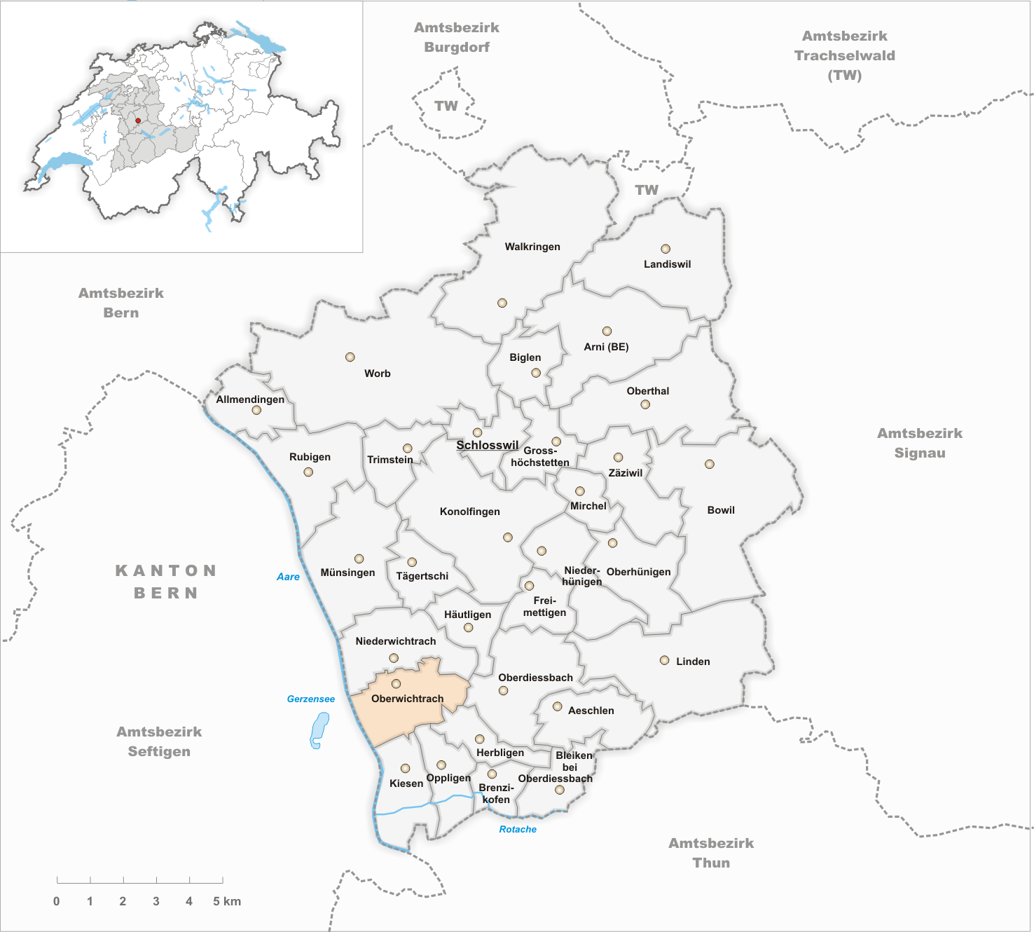 Municipality Oberwichtrach